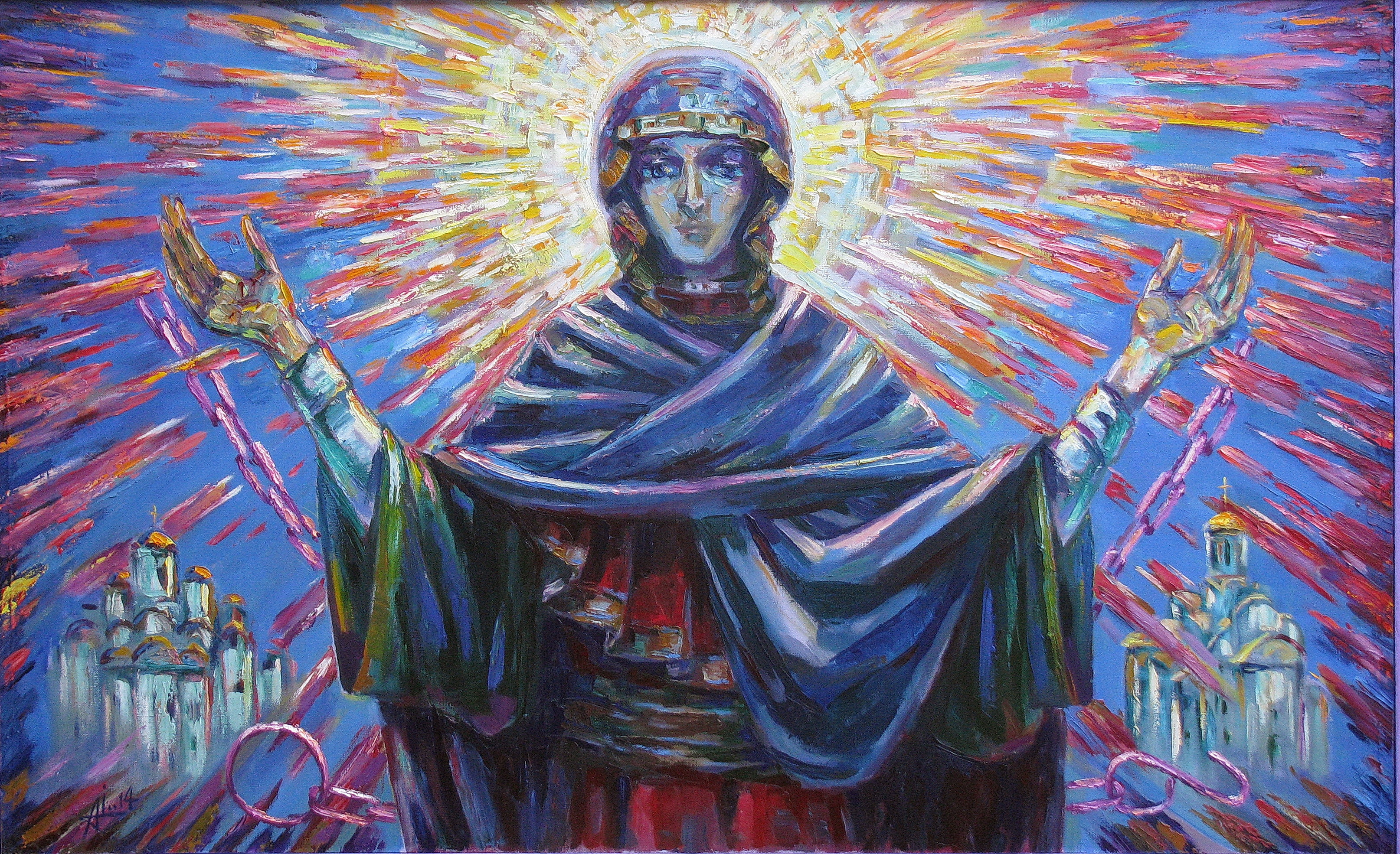 "Еўфрасіння Полацкая з вярыгамі" Алесь Цыркуноў палатно, алей 2012 г.